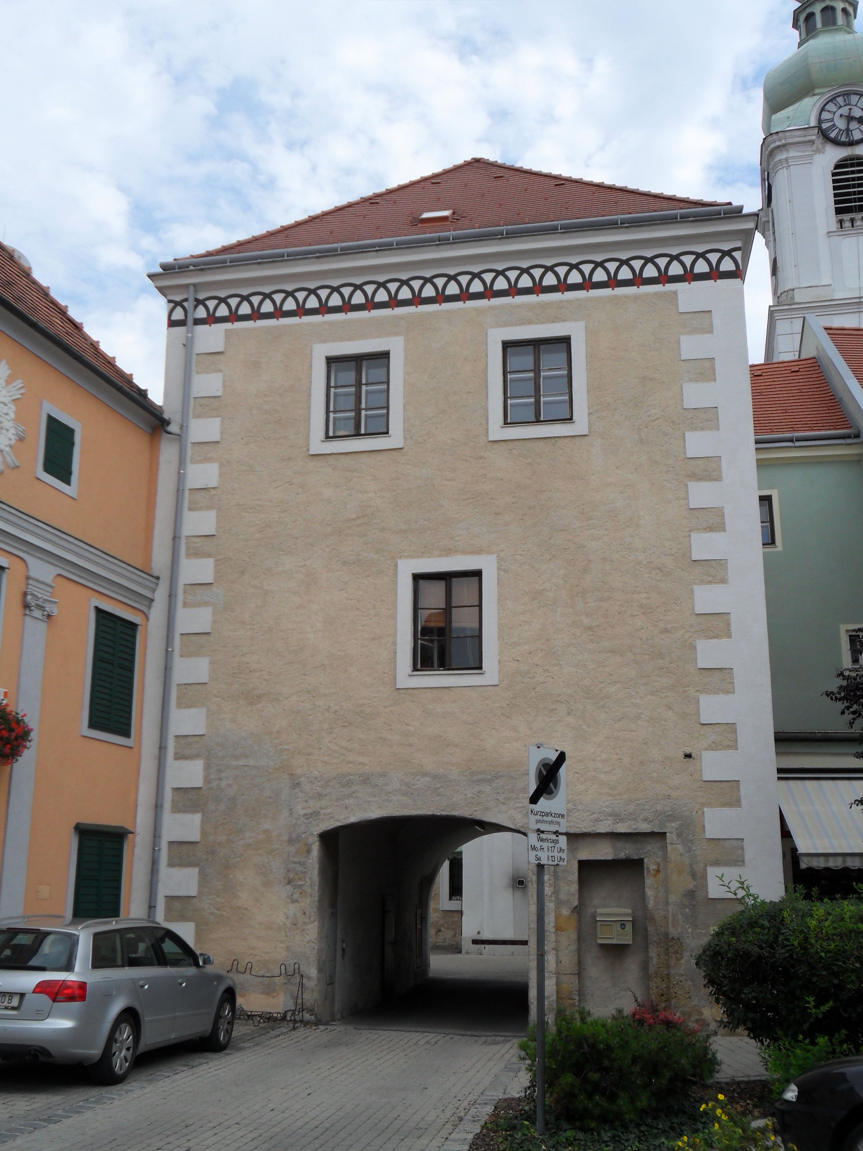 Stadttor in Neunkirchen